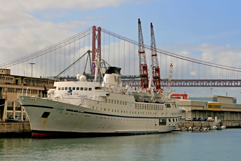 On Explore #391 - 5.2.2008